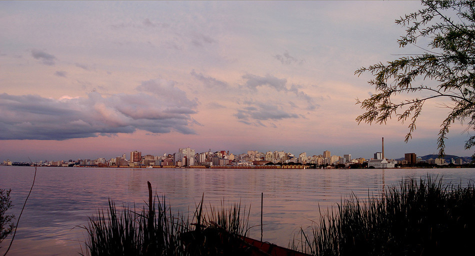 Vista panorâmica de Porto Alegre, Brasil, a partir da ilha da Pintada.